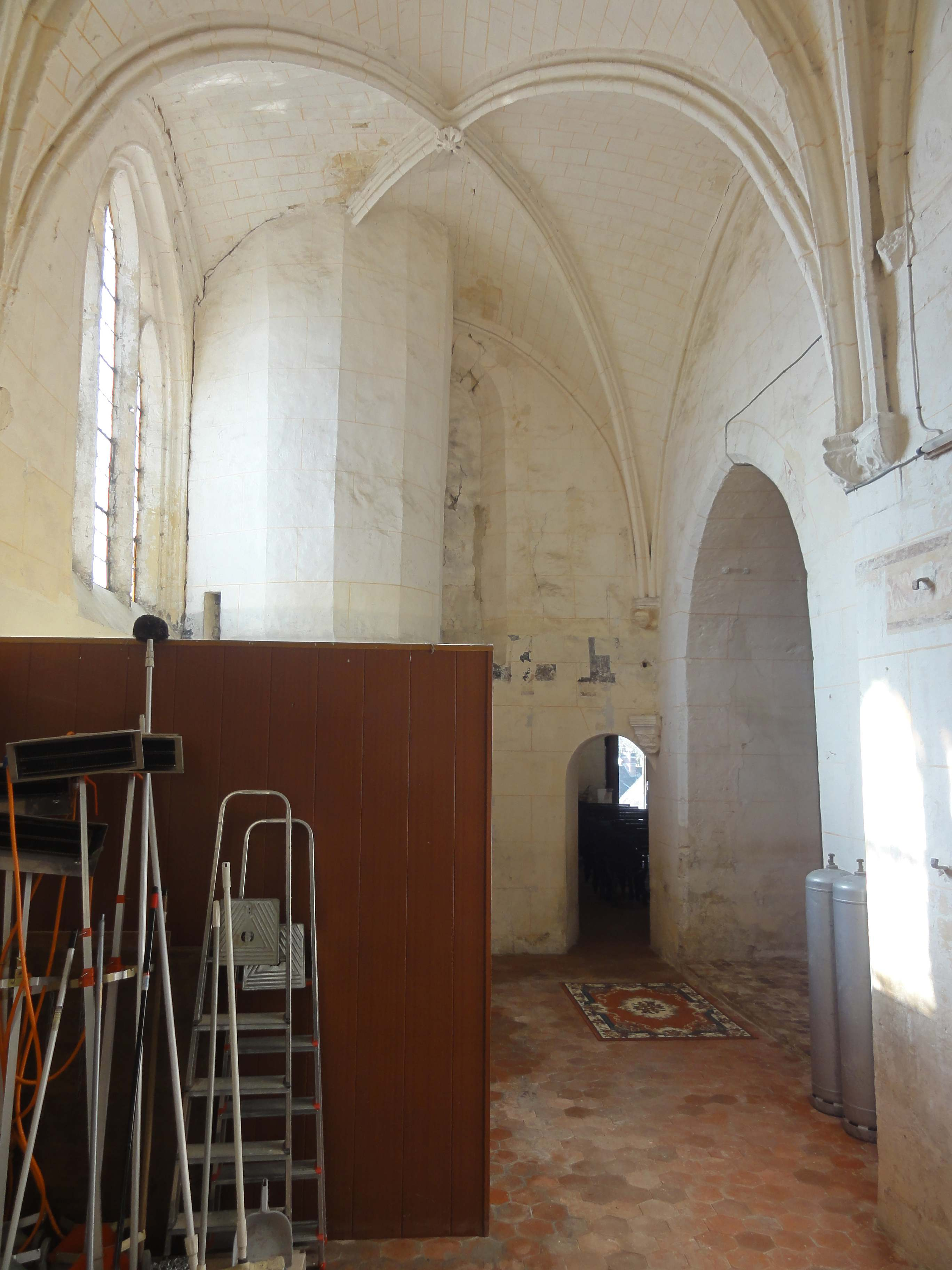 Intérieur de l'église - voir titre.